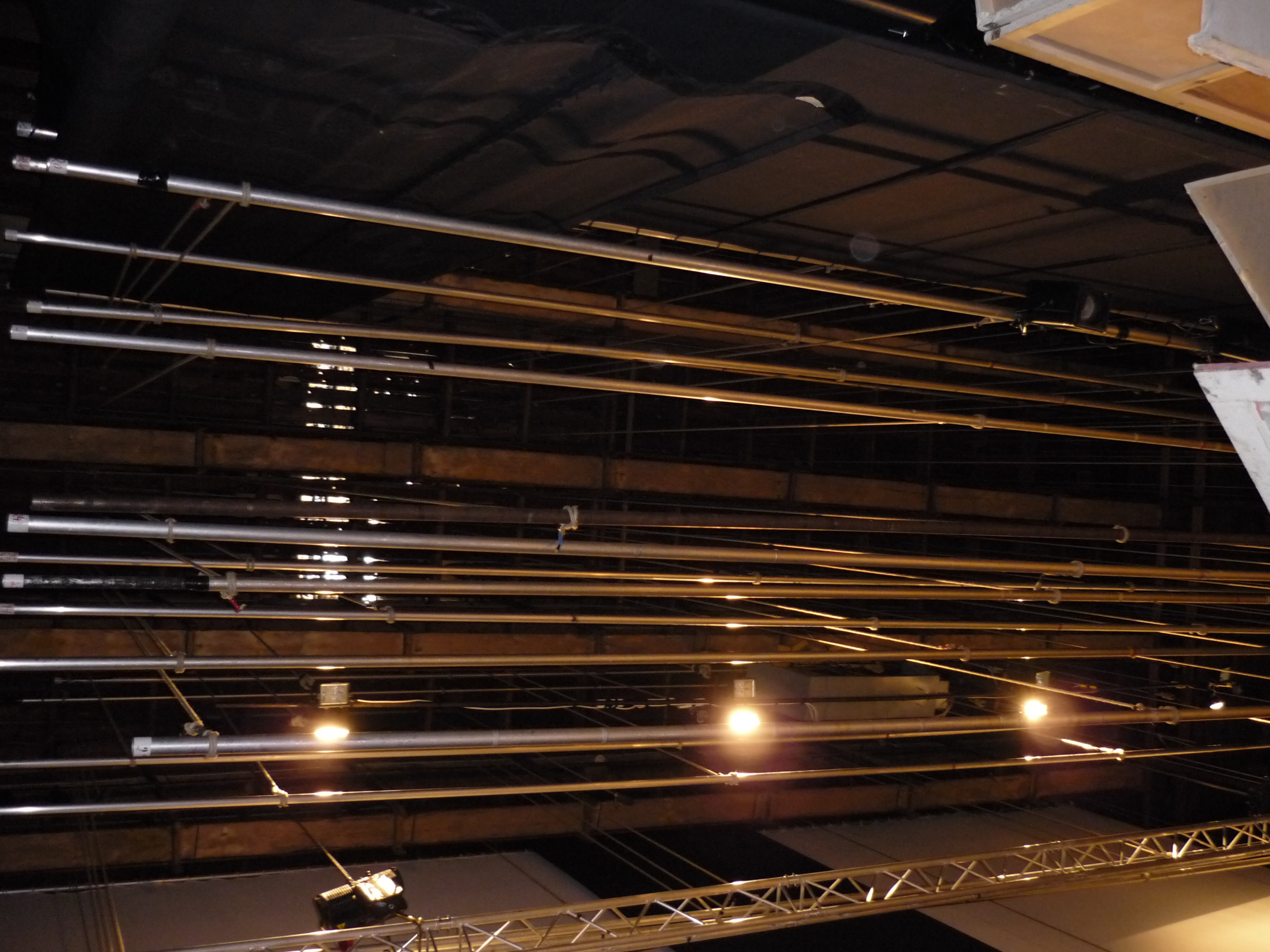 Cintres du Théâtre royal des Galeries vu depuis la scène.